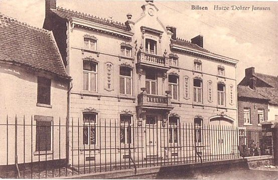 Goed Petry in Bilzen, circa 1920